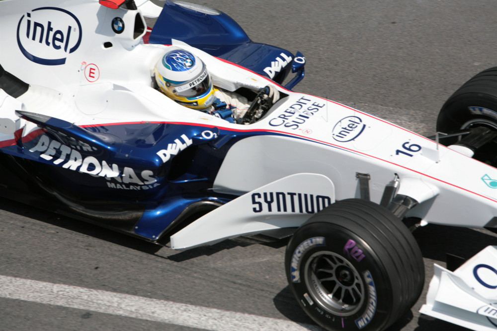 Nick Heidfeld, (BMW Sauber), Grand Prix automobile de Monaco 2006, Séance d'essais libres, 25 mai 2006